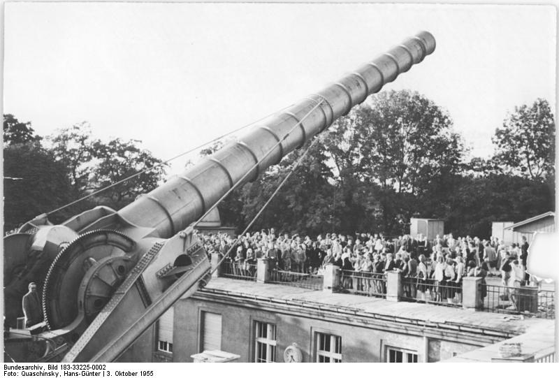 Berlin, Jugendstunde, Besuch einer Sternwarte Zentralbild Quasch. 3.10.1955 Erste Jugendstunde Am 3.10.1955 wurde in der Deutschen Demokratischen Republik und im demokratischen Sektor von Groß-Berlin die erste Jugendstunde zur Vorbereitung der Jugendweihe durchgeführt. Etwa 400 Jugendliche des Stadtbezirks Treptow trafen sich in der Archenhold-Sternwarte, wo ihnen der Direktor Wattenberg einen einführenden Vortrag in das Gebiet der Astronomie hielt. UBz: Die Jugendlichen besichtigen den 21 m-Refraktor der Sternwarte.